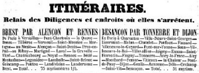 Encart publicitaire publié dans la revue "La Diligence" en 1845 indiquant les relais de diligence sur les itinéraires de Paris à Brest et de Paris à Besançon.